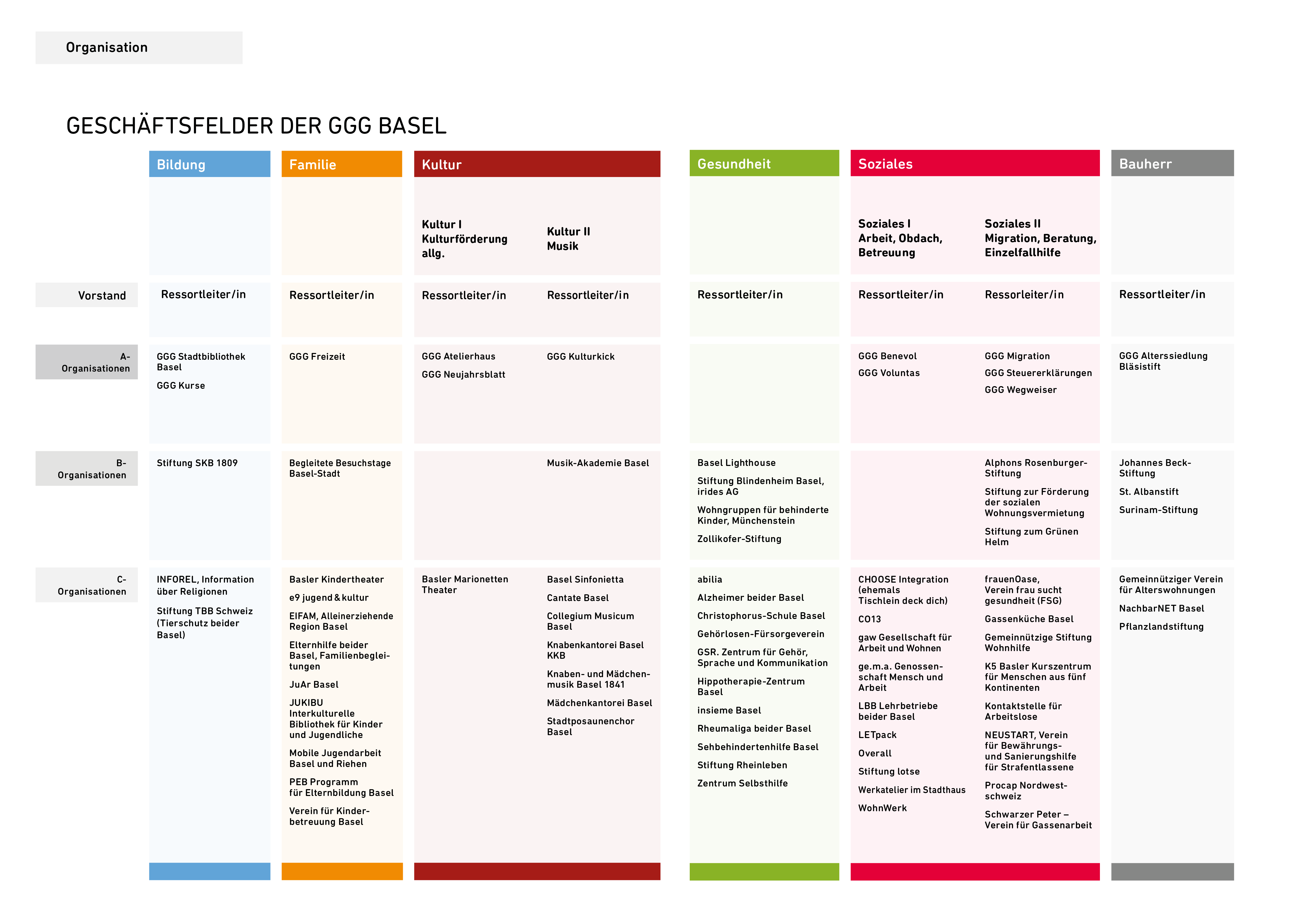 Die Grafik visualisiert die Geschäftsfelder der GGG Basel